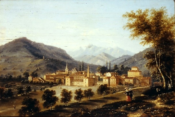 Tableau : vue générale de Allevard en XIX siècle, du peintre Guesdy.